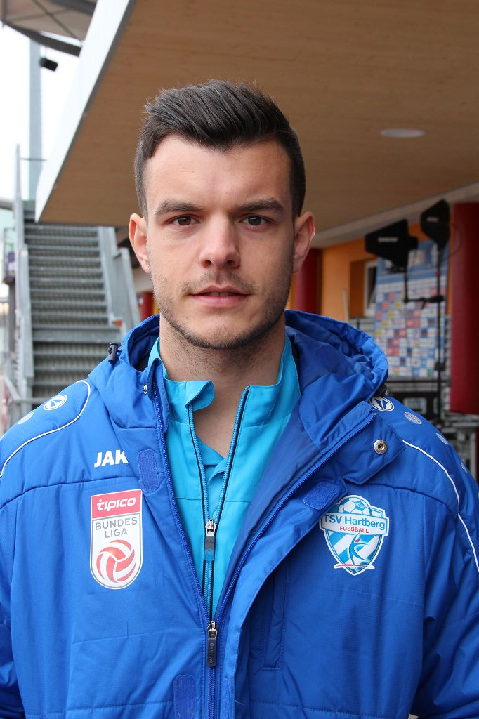 Philipp Siegl (Hartberg)